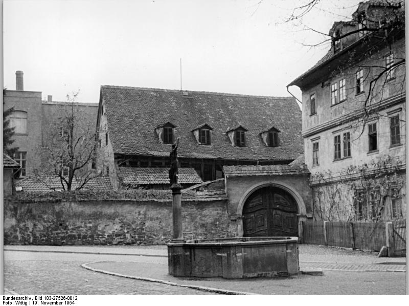 ADN-ZB-TBD-Wittig 19.11.1954 Das 1250-jährige Arnstadt Ubz.: Brunnen der Oberkirche mit altem Brauhof, beide aus dem 16. Jahrhundert.